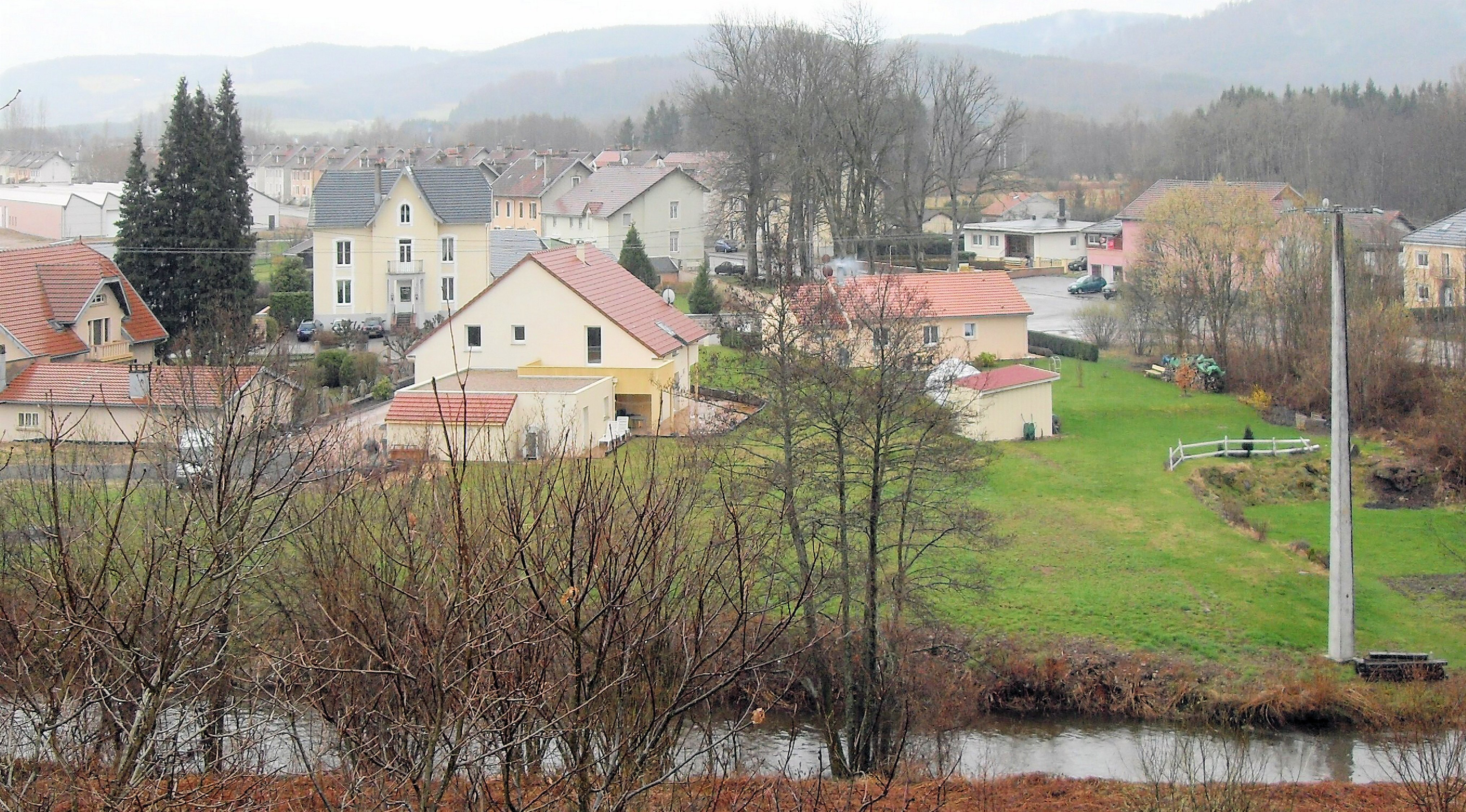 Vue de Laveline-devant-Bruyères, au premier plan, le Neuné